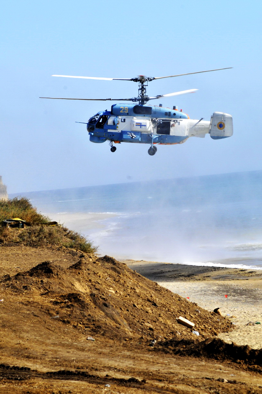 вертоліт Ка-27 ВМС ЗС України здійснює посадку на морське узбережжя Фото Олександр Шепелєв